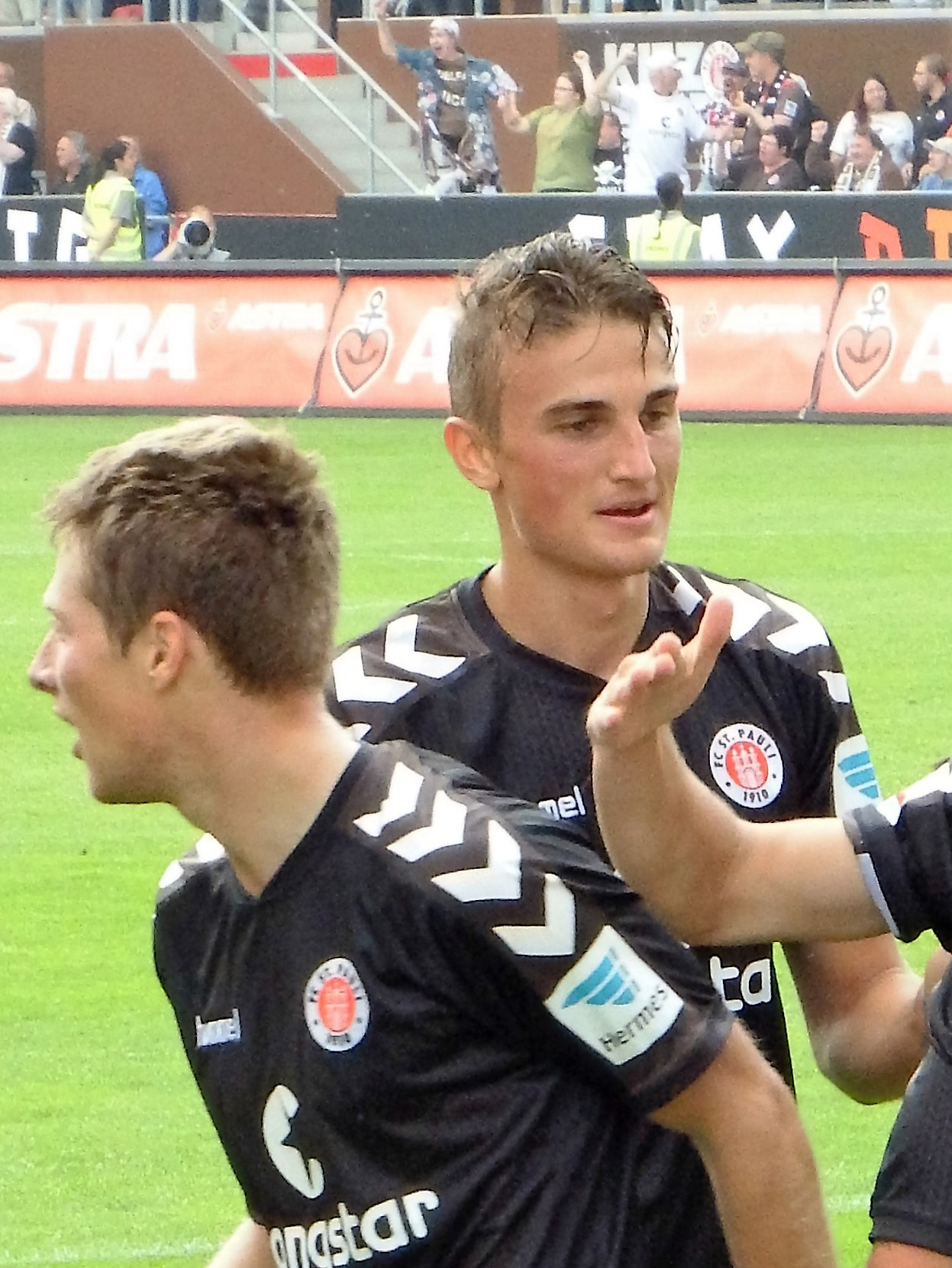 Ziereis, Philipp FCSP